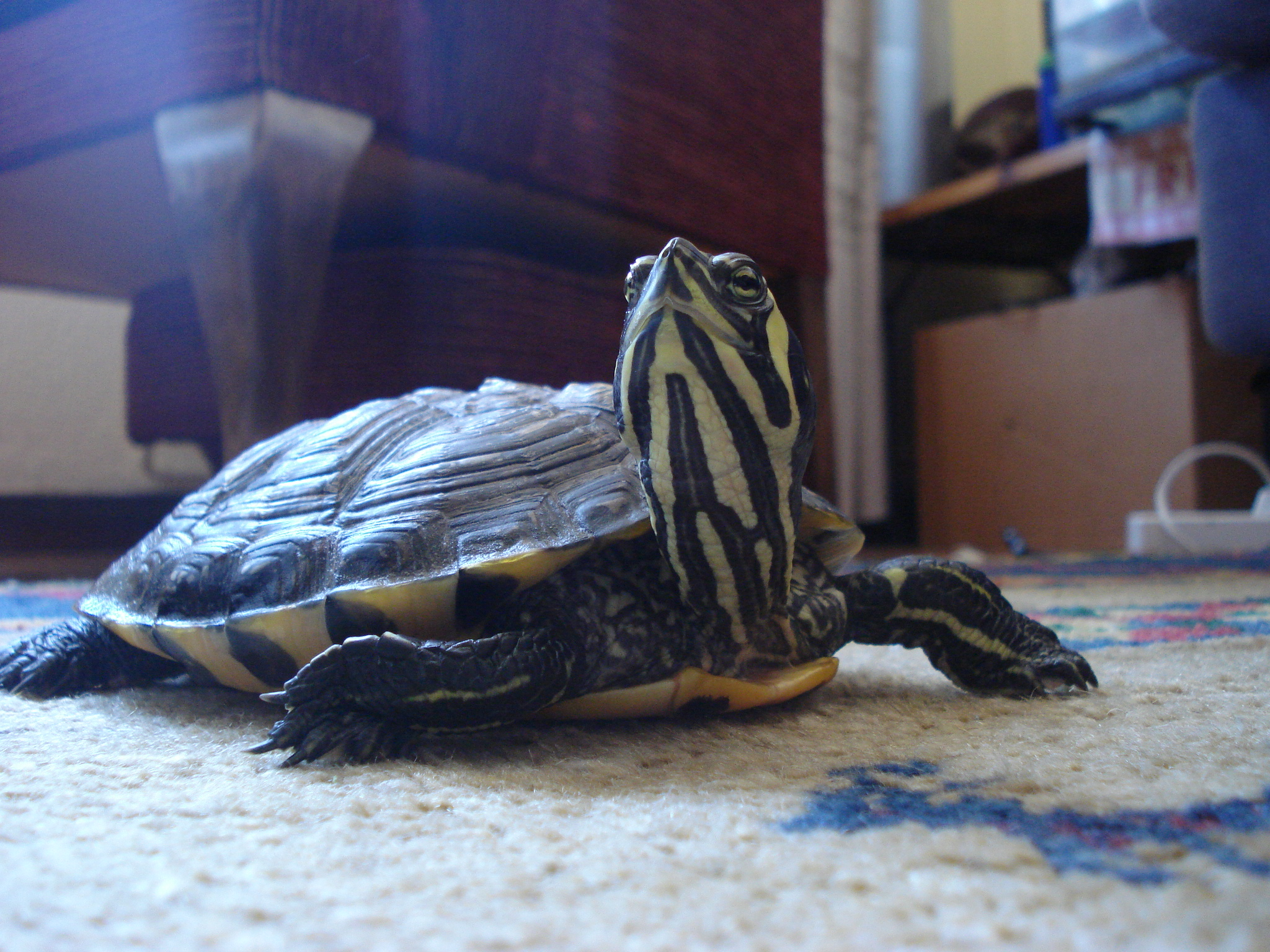 Ejemplar de Trachemys Scripta Scripta como mascota, con las extremidades estiradas